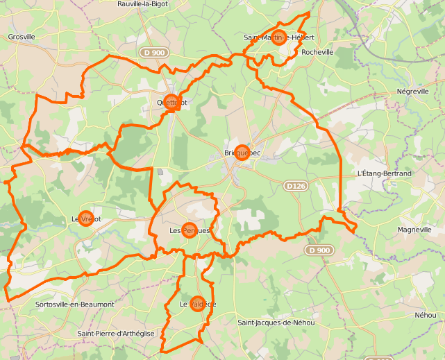 Carte de la commune nouvelle de Bricquebec-en-Cotentin et ses communes déléguées